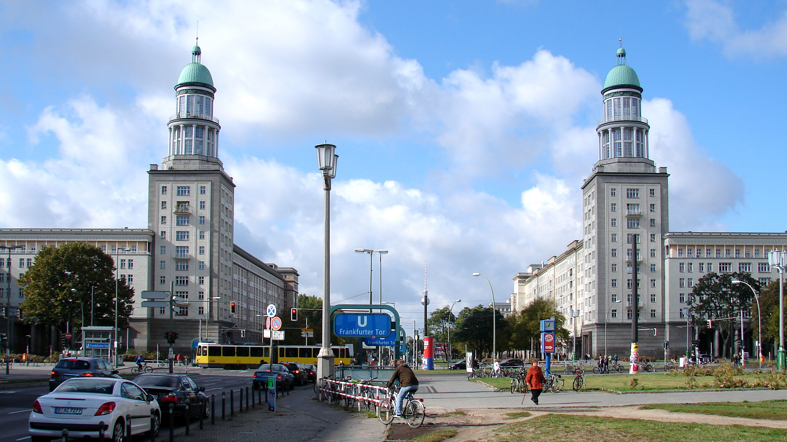 Das Frankfurter Tor ist heute ein Platz im Berliner Ortsteil Friedrichshain am östlichen Ende der Karl-Marx-Allee.